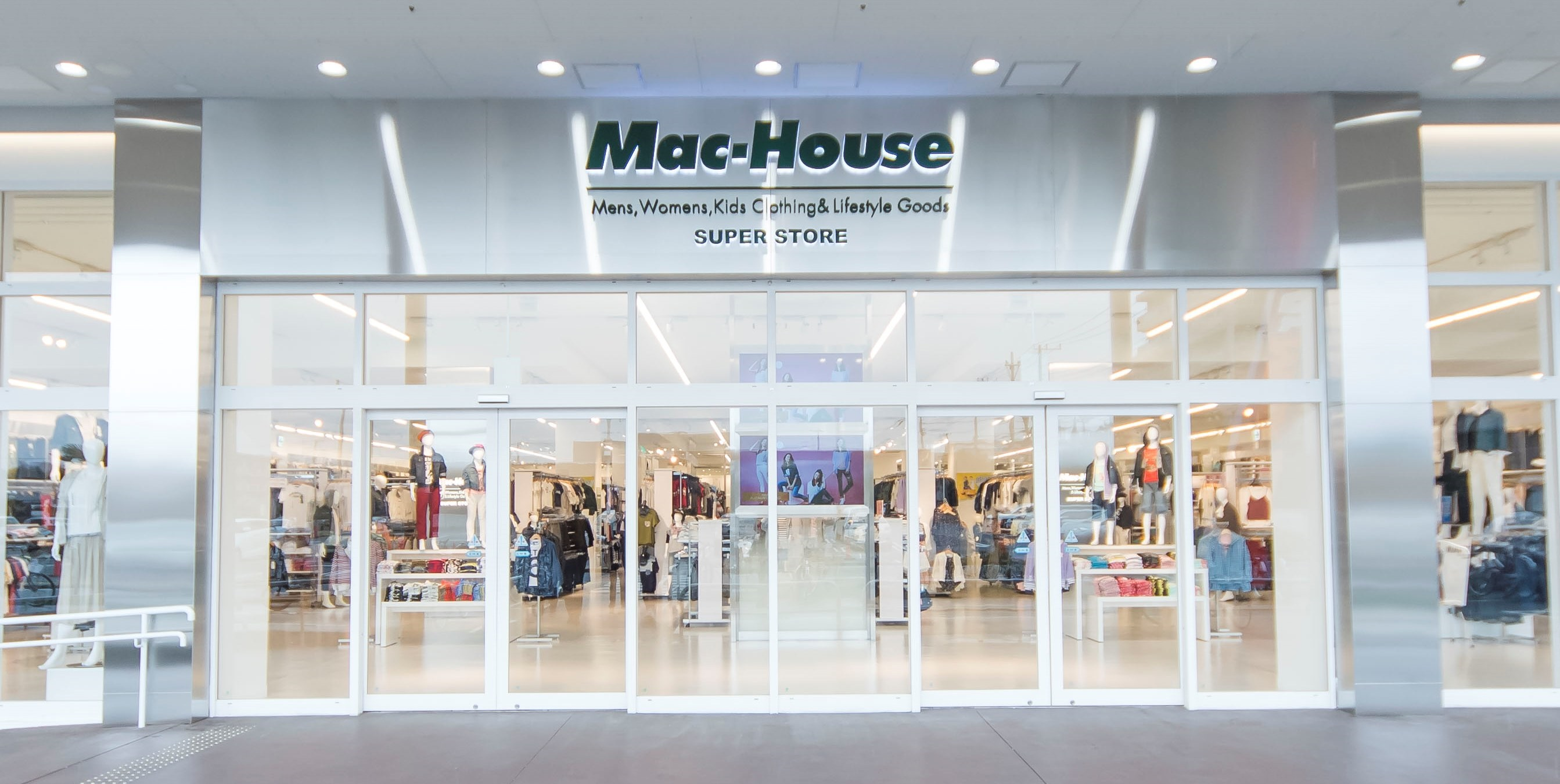 2017年3月18日オープンしたマックハウス湘南藤沢店です。